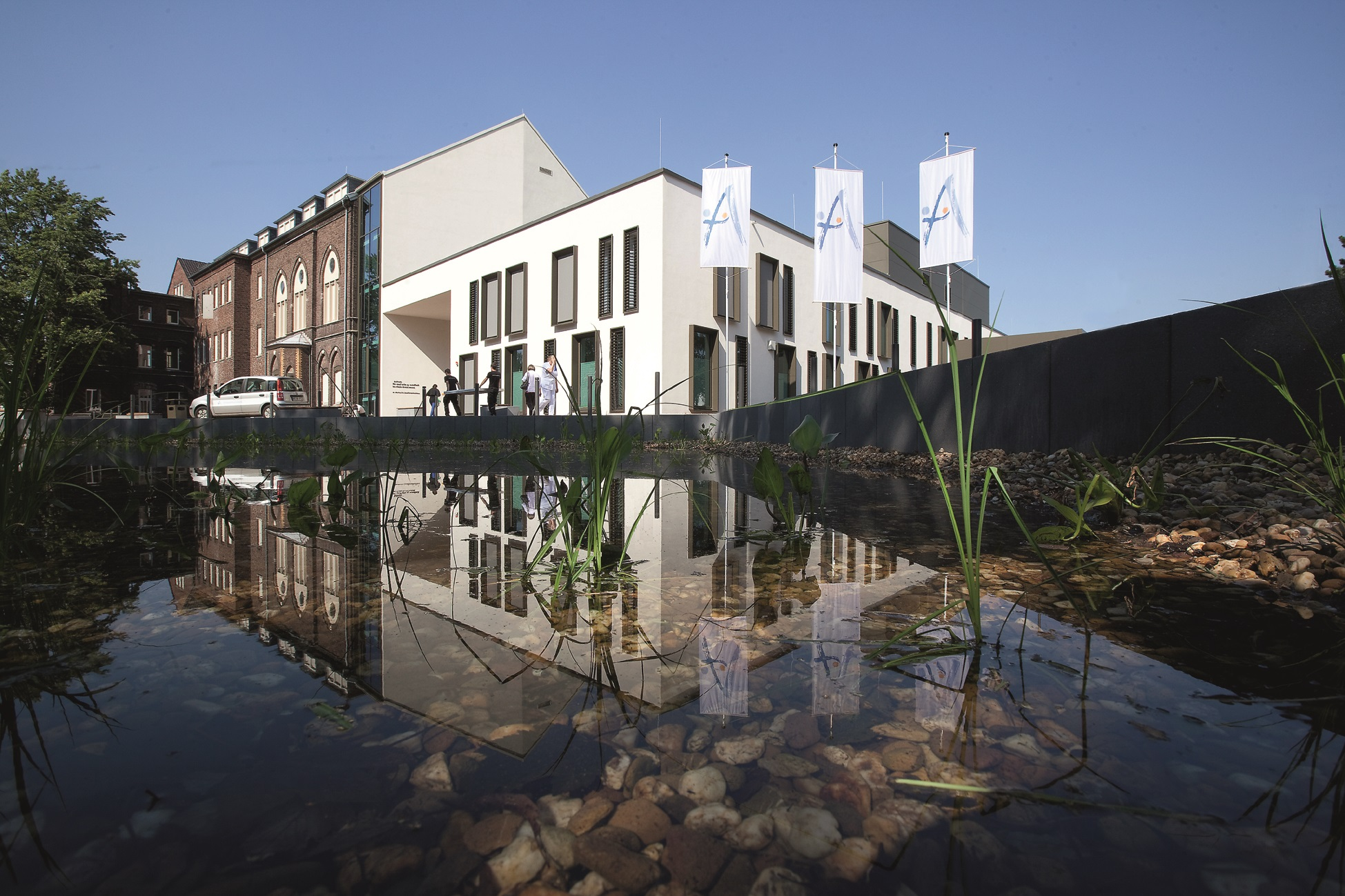 Außenaufnahme des St. Alexius-/ St. Josef-Krankenhaus